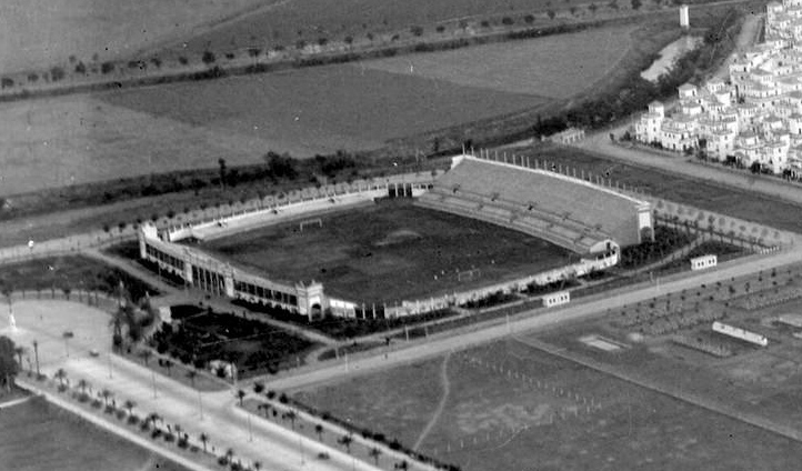 Vista del estadio de la Exposición (Actual estadio Benito Villamarín) y de la avenida de la Palmera en Sevilla, hacia 1929.